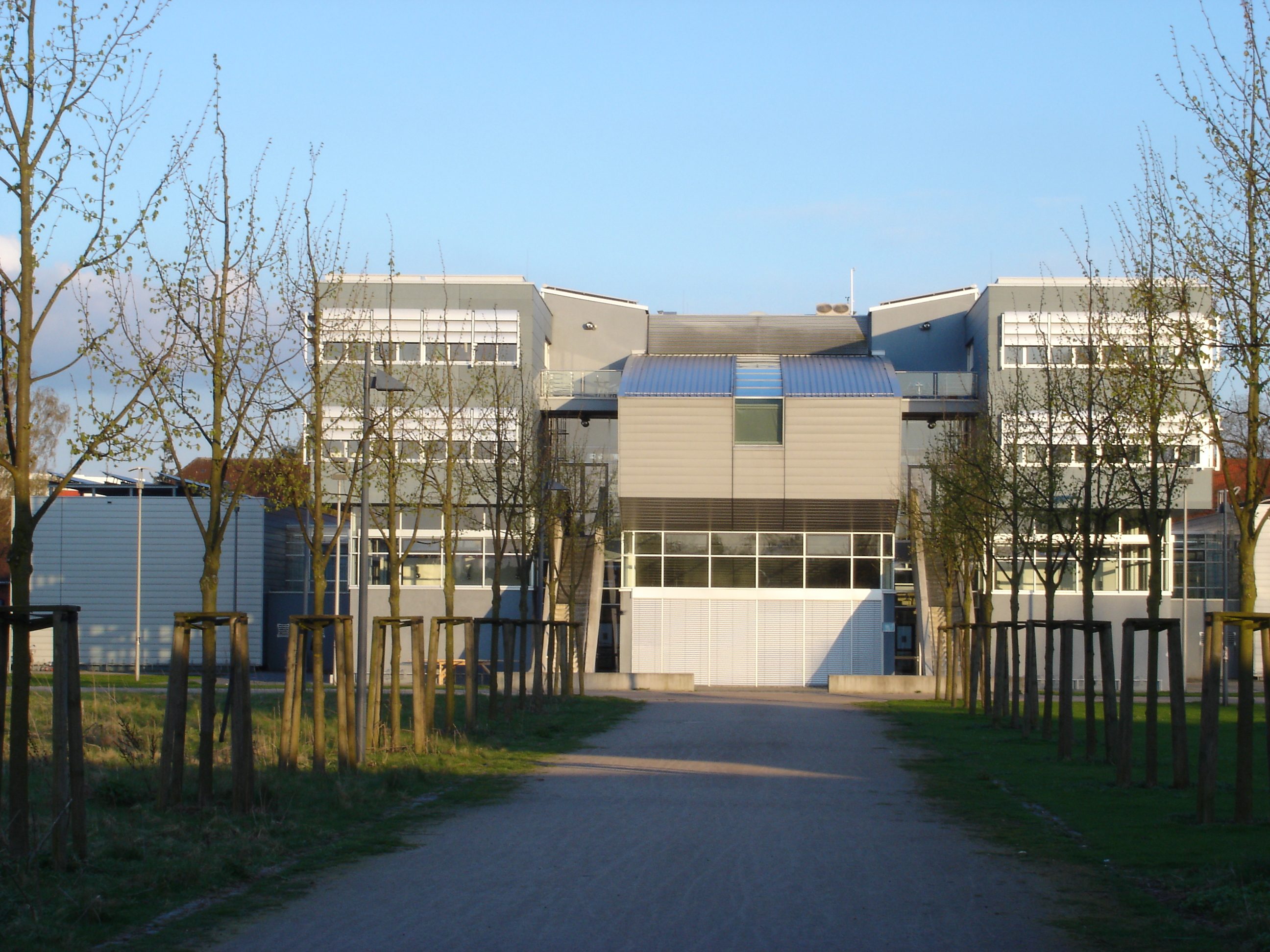 Hauptgebäude der Kunstakademie auf dem Leonardo-Campus in Münster, Westfalen, Deutschland